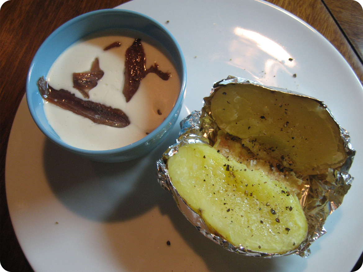 Ajoblanco con su 'papa asada'